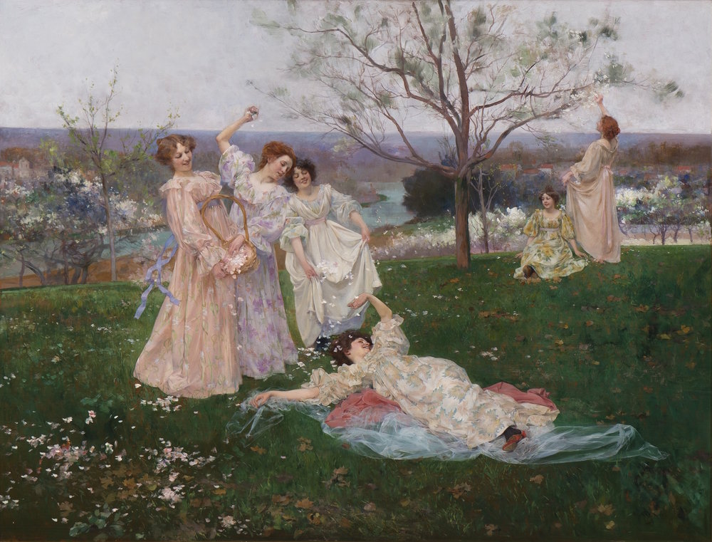 Fleurs de Printemps